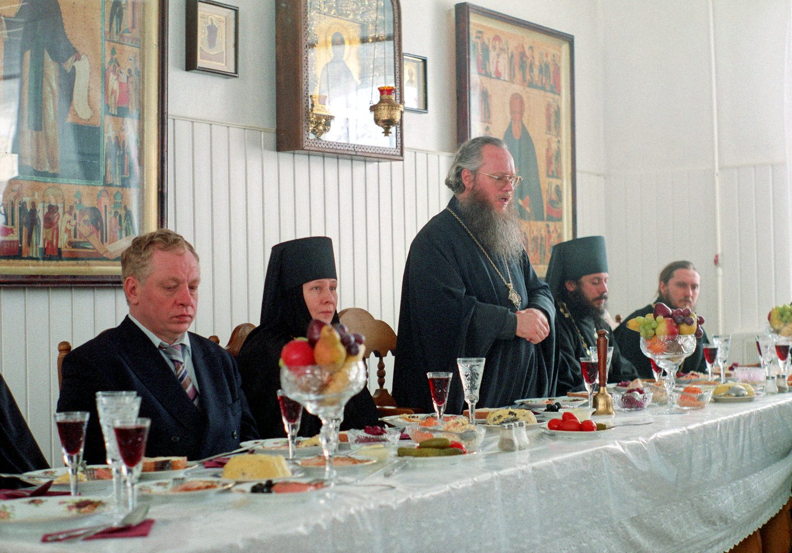 Трапеза после богослужения на праздник преподобного Димитрия Прилуцкого 24 февраля 2002 года. Слева направо: Виктор Иванович Тырышкин (ктитор Никольского монастыря), игумения Евстолия (Ольга Сергеевна Афонина, настоятельница Никольского женского монастыря), епископ Иосиф Балабанов (тогда викарий Ярославской епархии, ныне архиепископ Биробиджанский и Кульдурский), игумен Иоанн Коваленко (наместник Даниловского монастыря, ныне епископ Калачаевский и Палласовский).